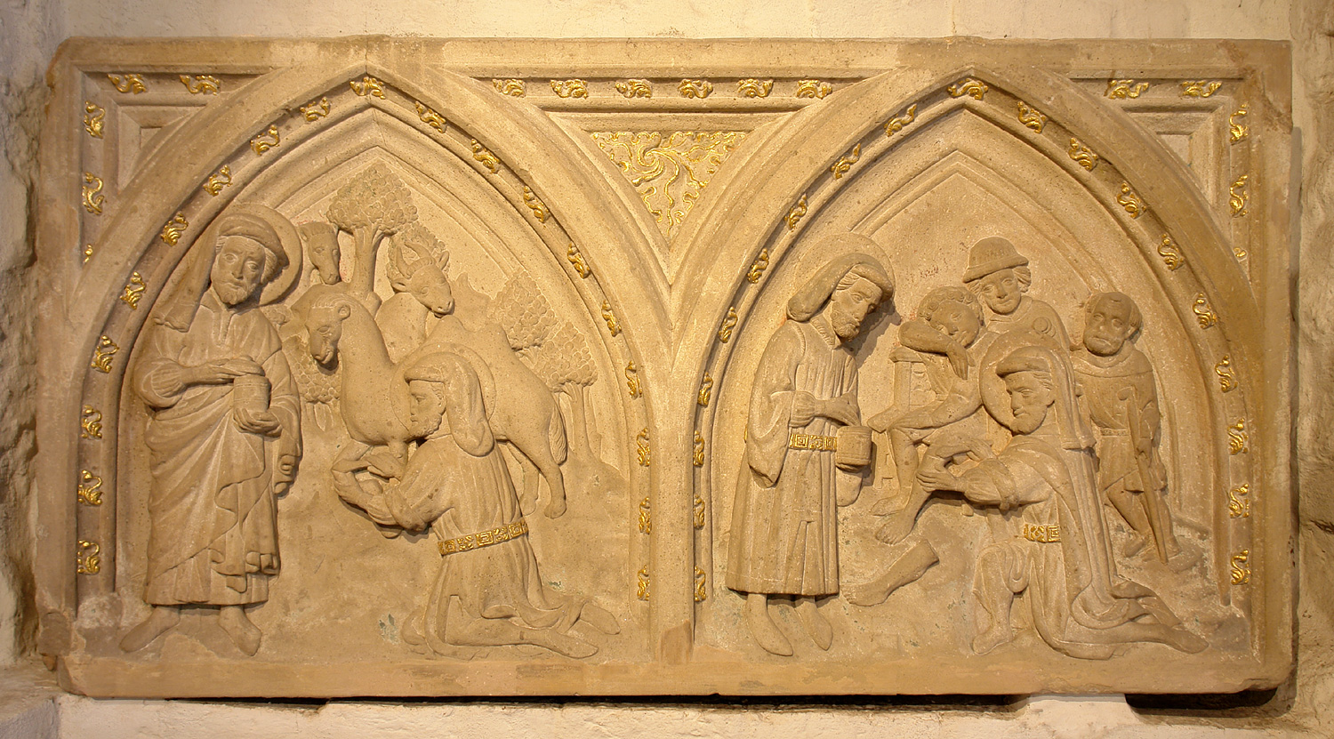 Bremer Dom-Museum: Relief der Heiligen Cosmas und Damian (um 1400). Sandstein, aus der sog. Knigge-Kapelle